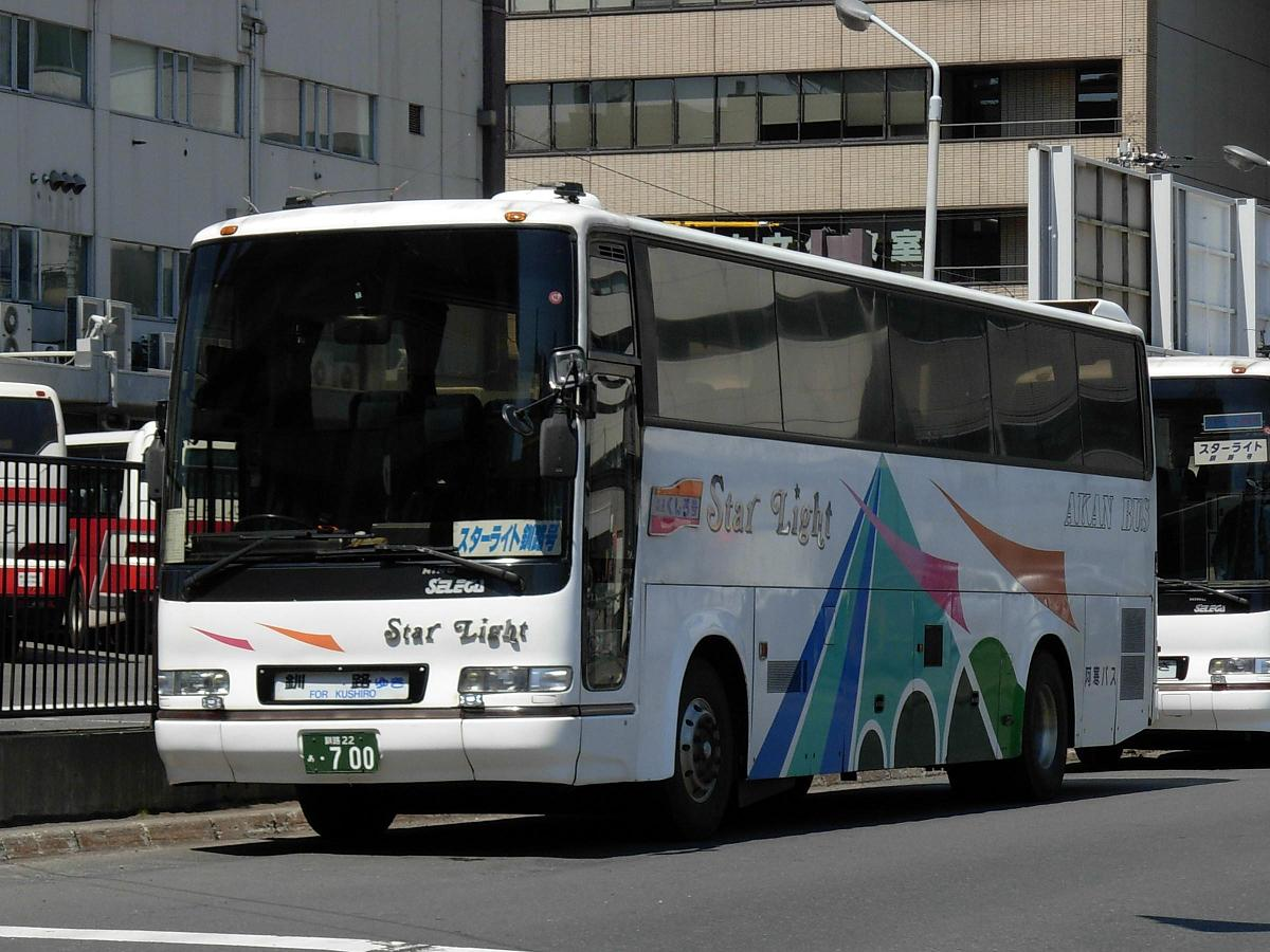 阿寒バスのスターライト釧路号車両（旧塗装）